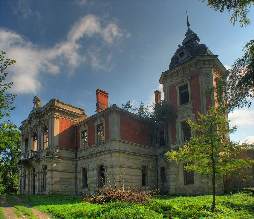 Руїни палацу Потоцьких в Тартакові